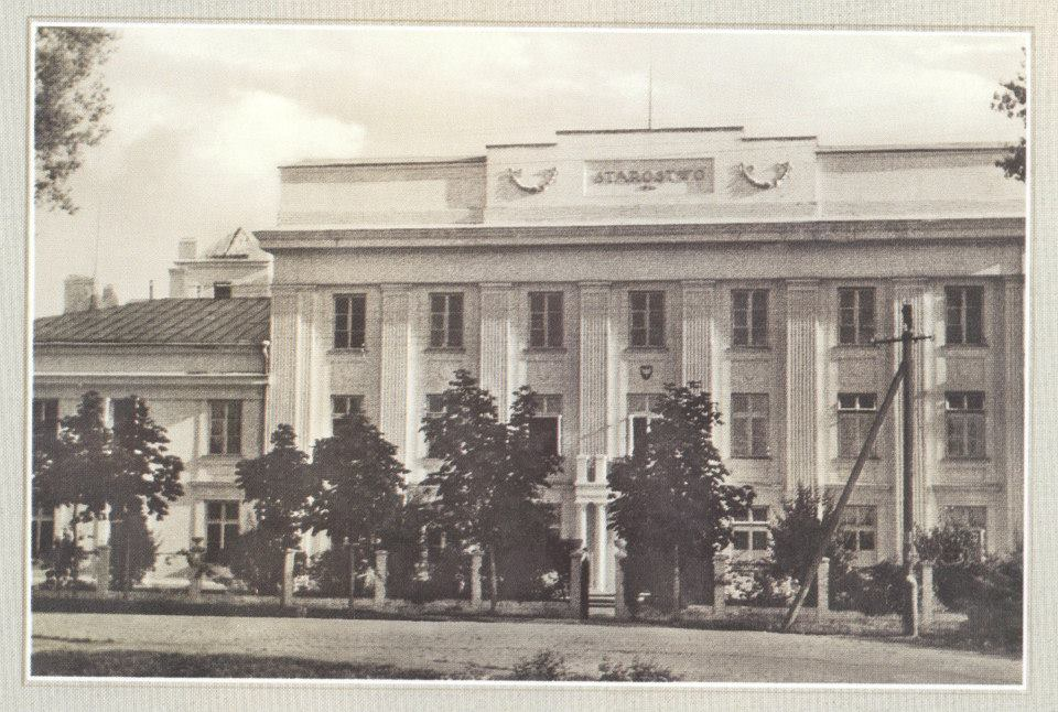 Беларуская (тарашкевіца): Маладэчна (Maładečna), вуліца Лібава-Роменская (vulica Libava-Romienskaja). Староства